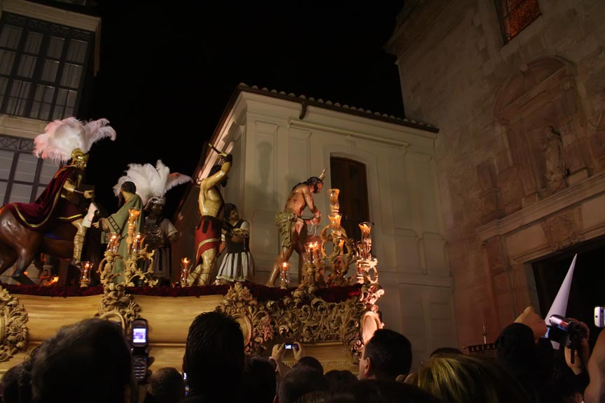 Flagelación en saludo